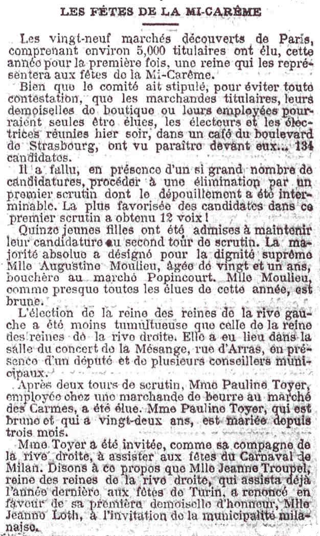 Compte-rendu d'élections de reines de la Mi-Carême parisienne en 1905.